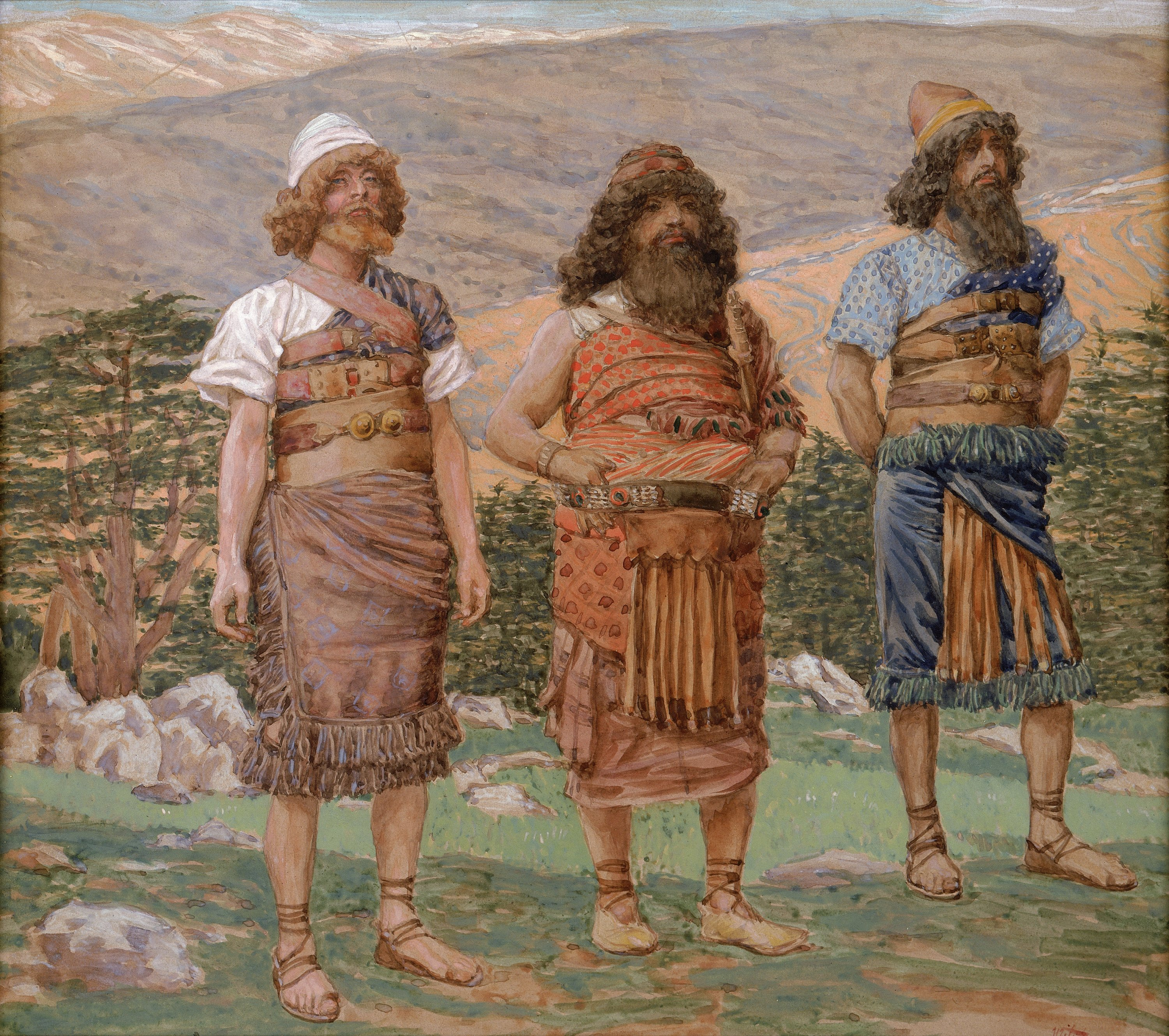 Shem, Ham & Japheth; the first sons of Noah (русский: Сим, Хам и Иафет - первые сыновья Ноя. Сим стал родоначальником семитских народов и языков, Хам- хамитских, а Иафет - яфетических.)